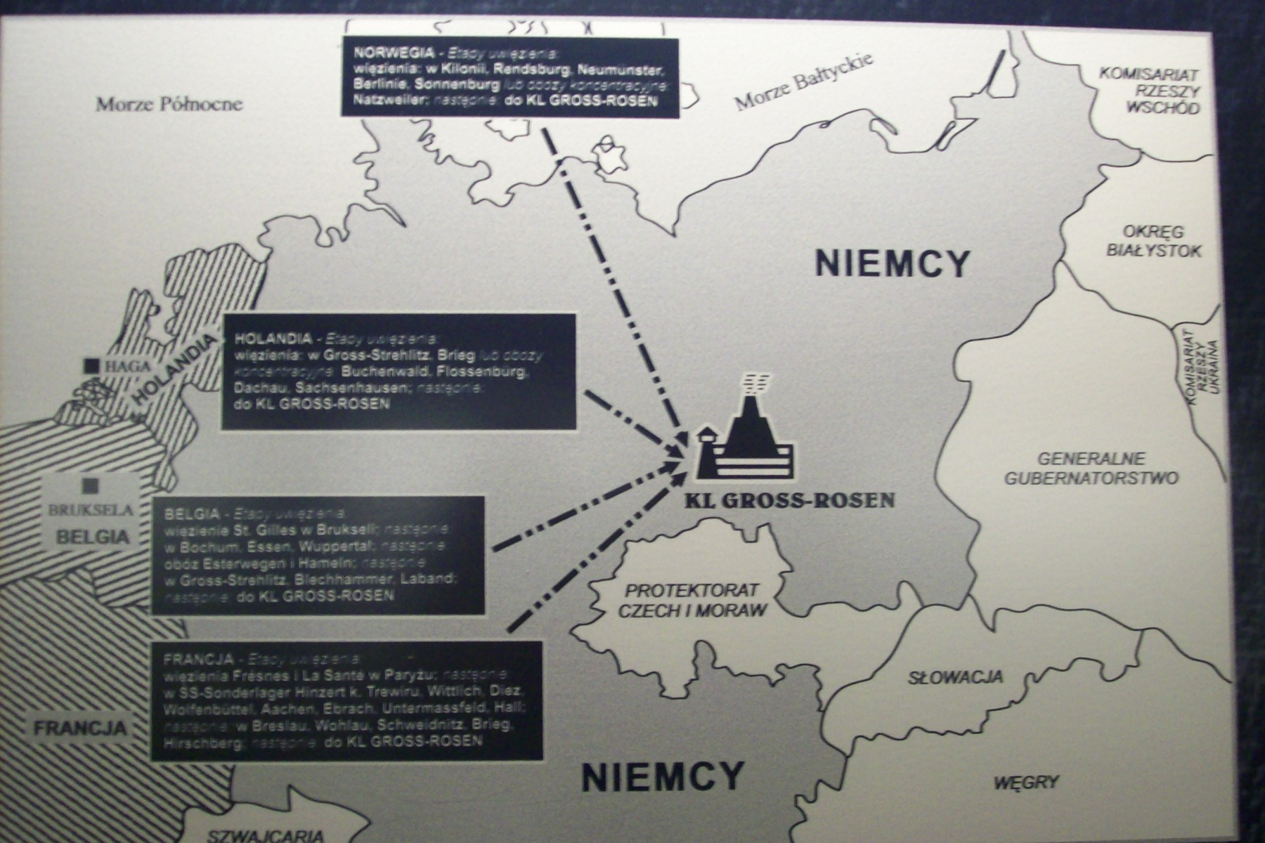 Informacje znajdujące się w muzeum KL Gross-Rosen w Rogoźnicy na Dolnym Śląsku